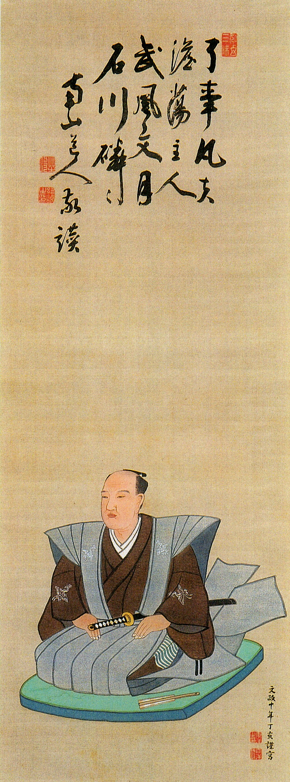 角田石川氏12代当主石川宗光の肖像画。